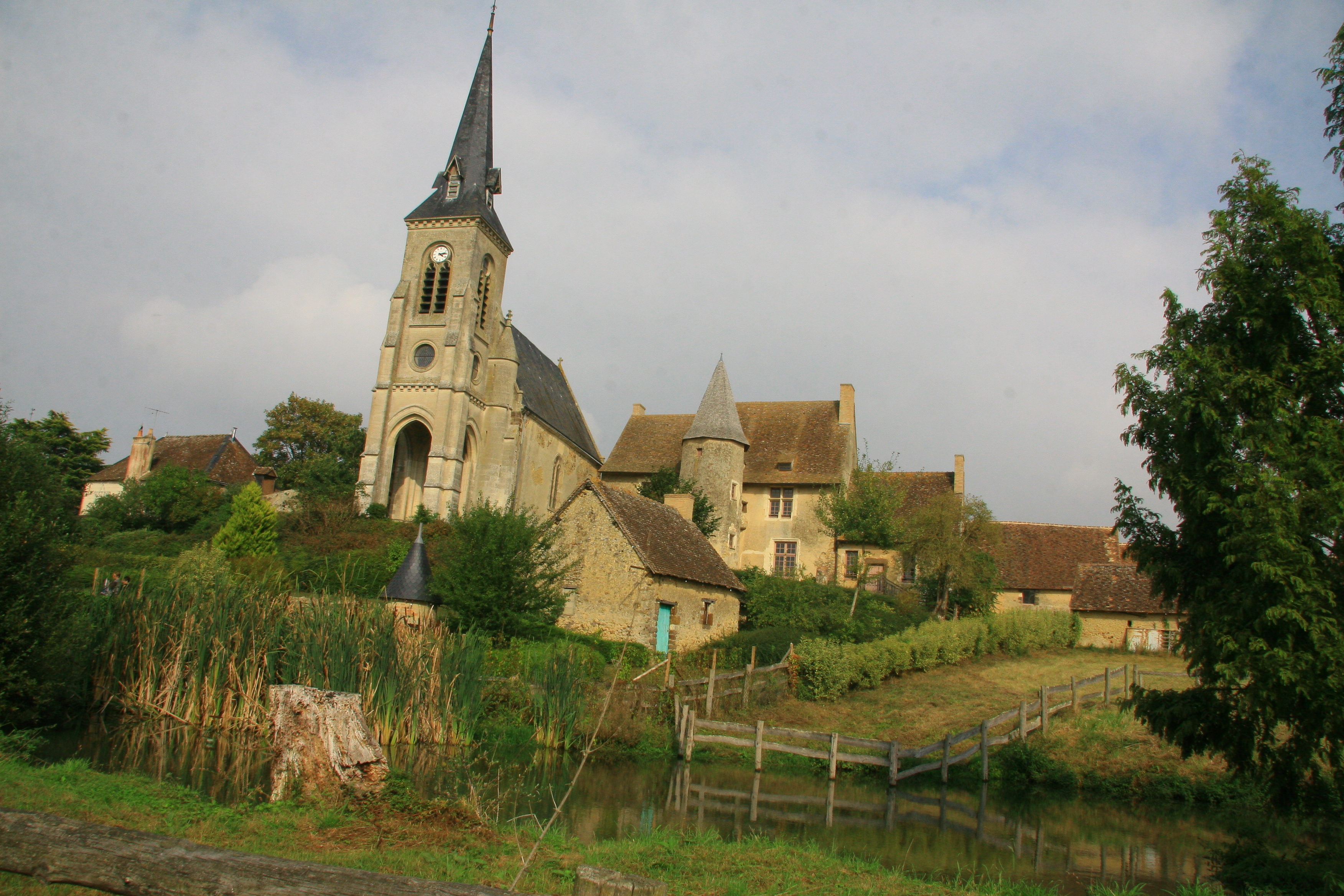 Chapelle Saint-Julien et Prieuré de Saint-Marceau, Sarthe, Pays de la Loire, France